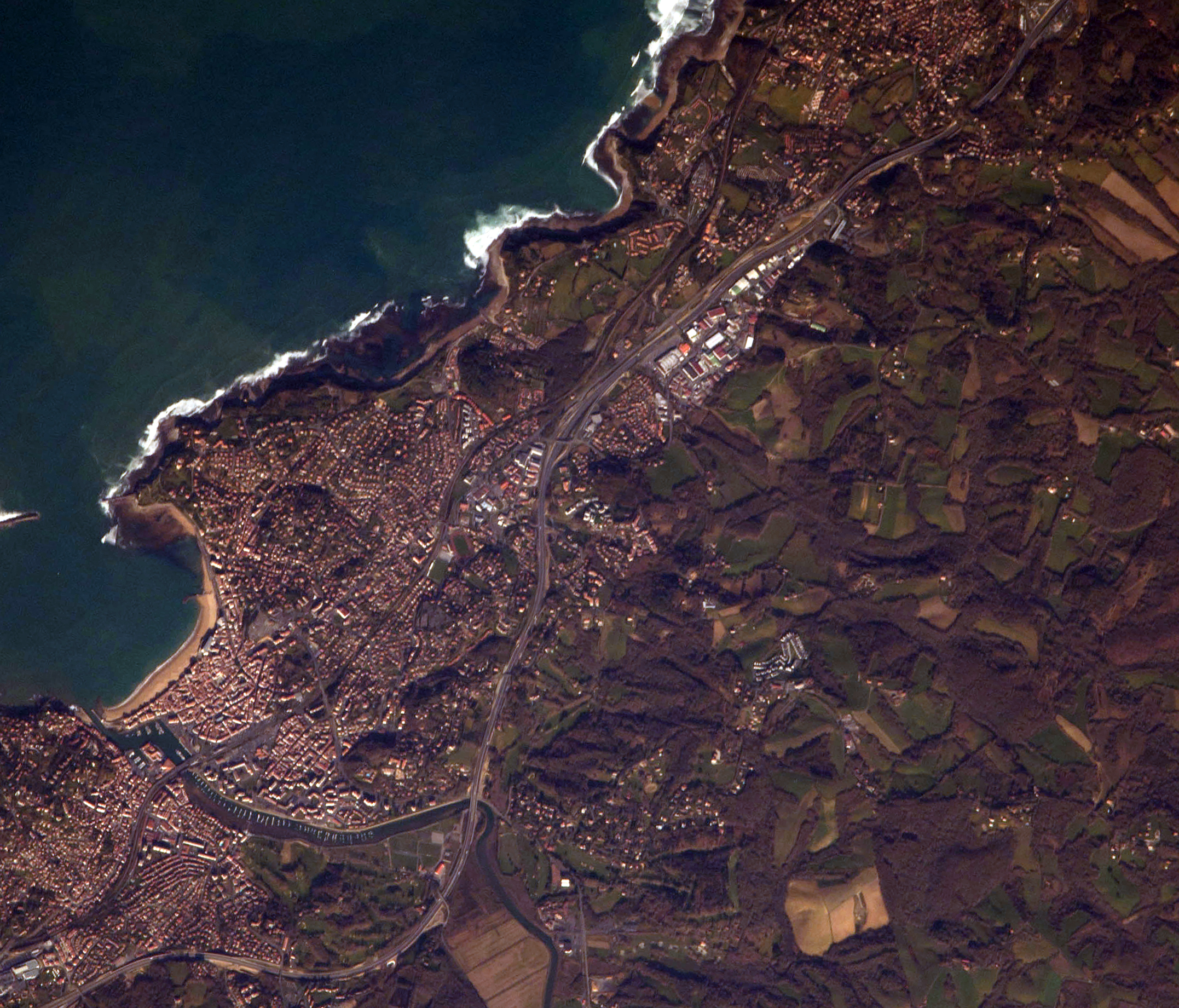 Donibane Lohizune, Nazioarteko Espazio Estaziotik ikusia.